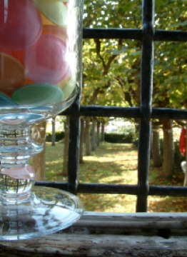 le mail de tilleuls vu à travers la grille (XVème) de la fenêtre de la cuisine du château de Bois-Briand